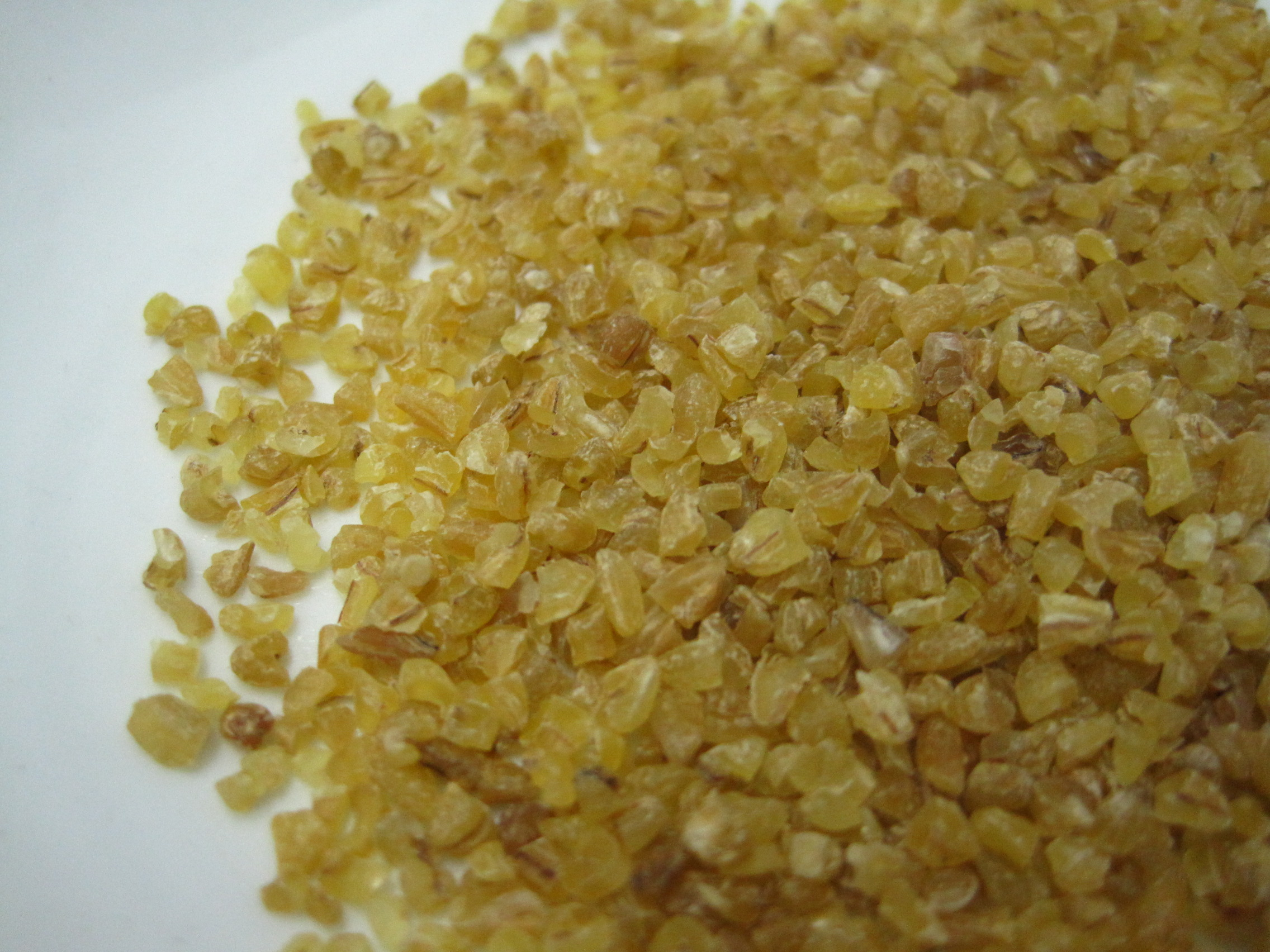 Bulgur, lomljeno zrno žita